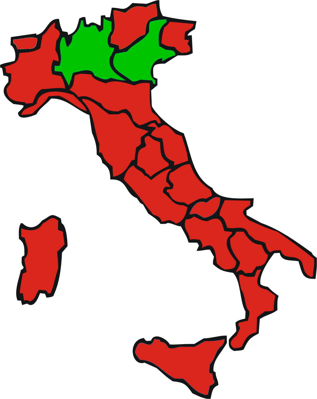 immagine creata sulla modifica di :Immagine:Italian Regional Elections 2005 (Before).png